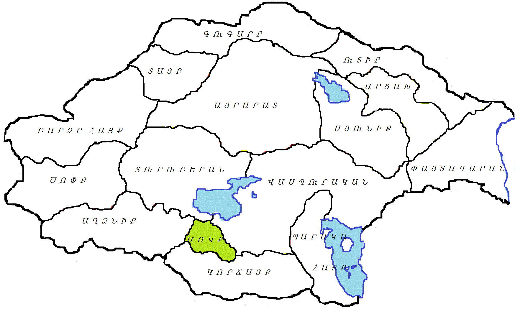 Մոկք, Մեծ Հայք